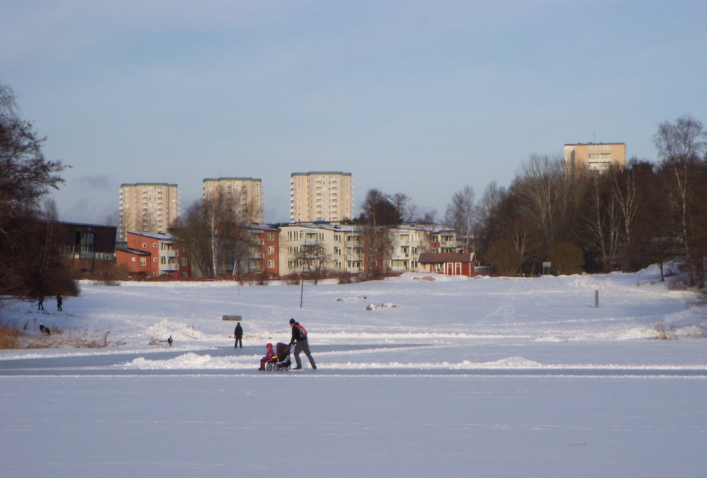 Farsta stands bebyggelse norr om Farsta strandbad